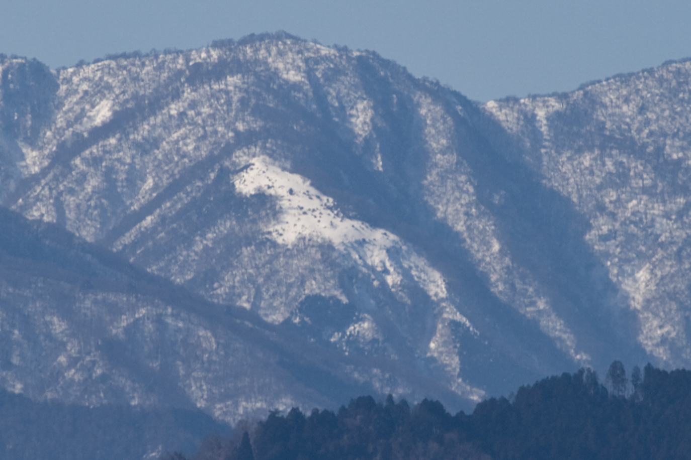 相模原市城山町川尻より望む鬼ヶ岩ノ頭と白馬の雪形。